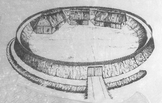 Ringwall von Burg, Rekonstruktion auf Schild an der Anlage